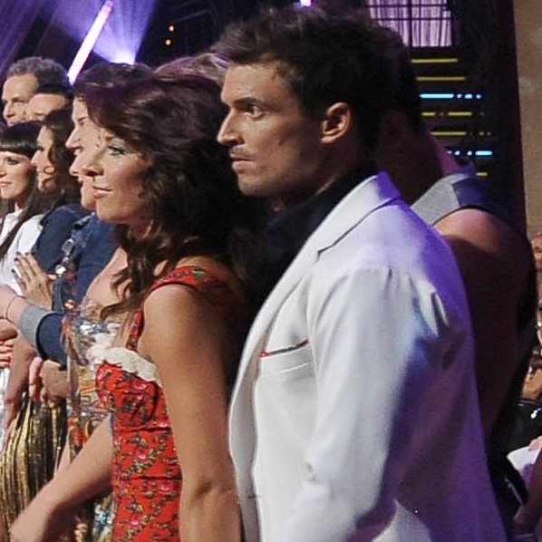 Polska edycja programu "Taniec z gwiazdami" - XIII edycja, odcinek 1 z 14.09.2011, emitowana w telewizji TVN.